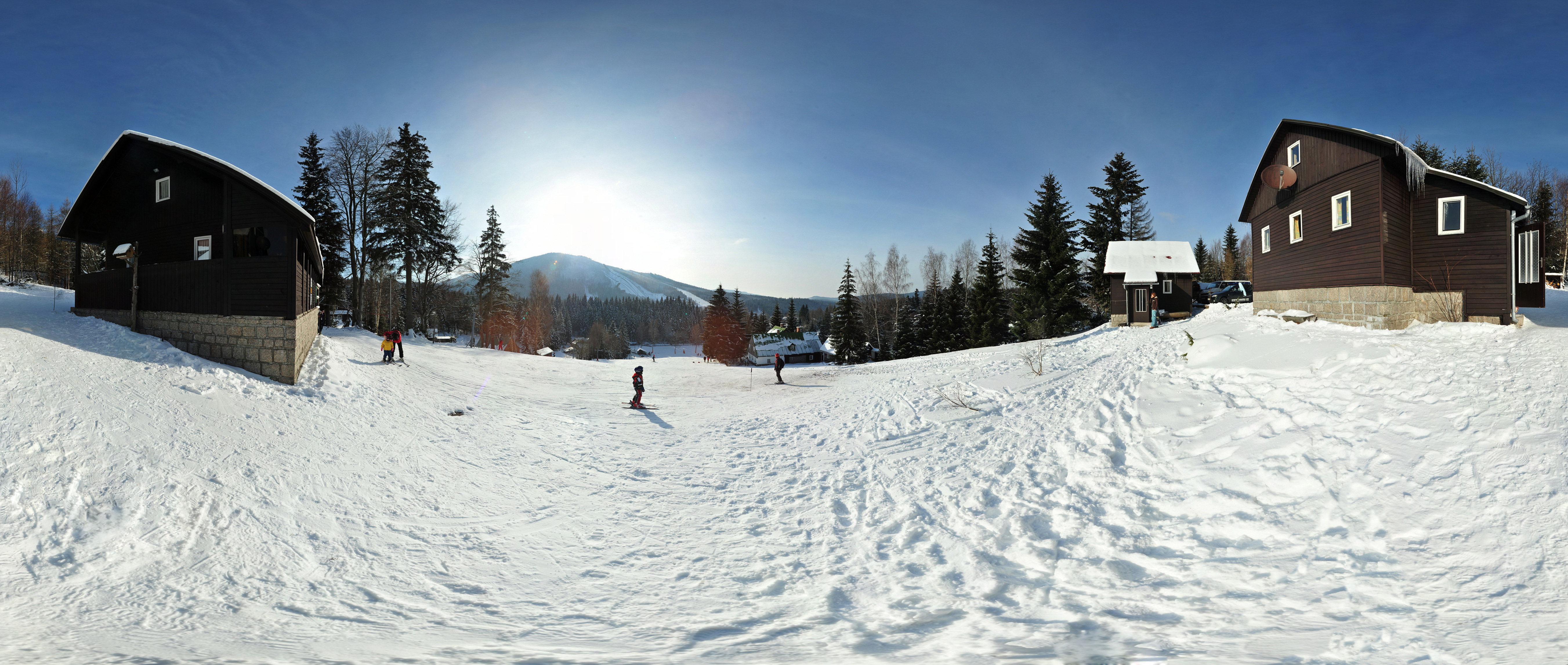 Harrachov, chaty Horačky